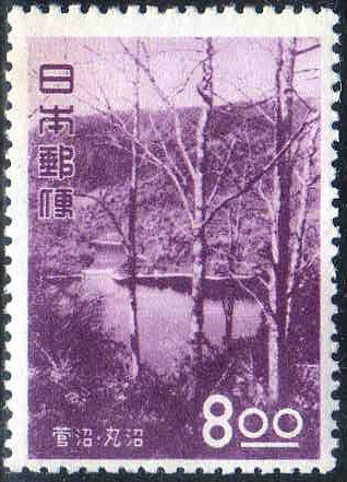 日本観光地百選のうち湖沼部門で一位になった丸沼の8円切手。